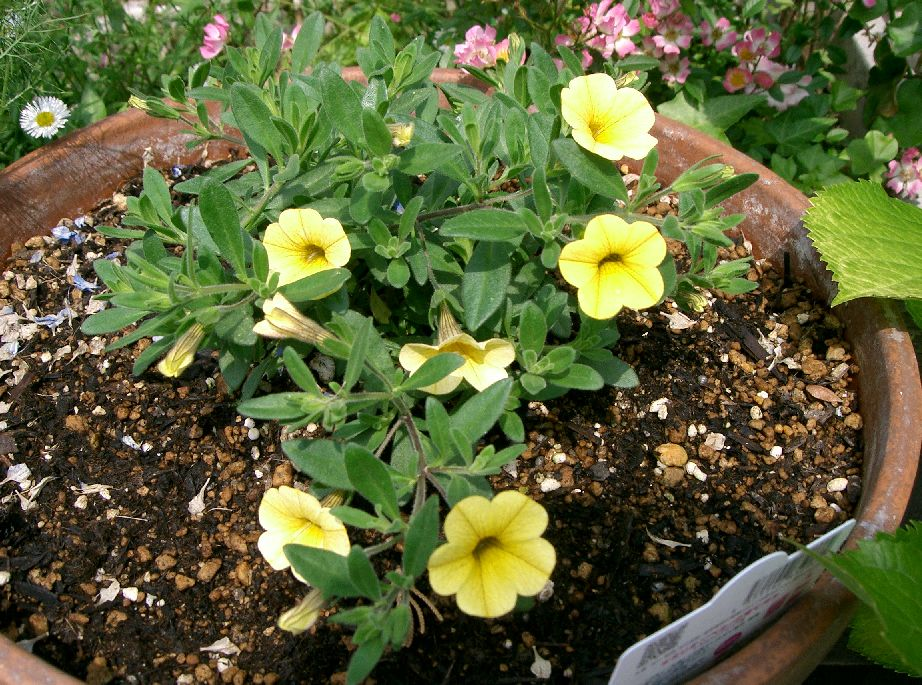 Calibrachoa hybridus cv . Million Bell